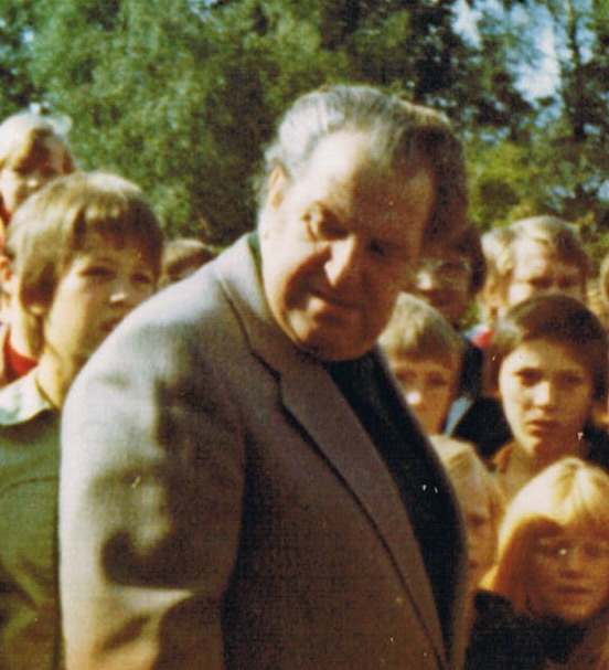 Heinz Eckner bei einem öffentlichen Auftritt, einen Tag nach der Show Am laufenden Band.